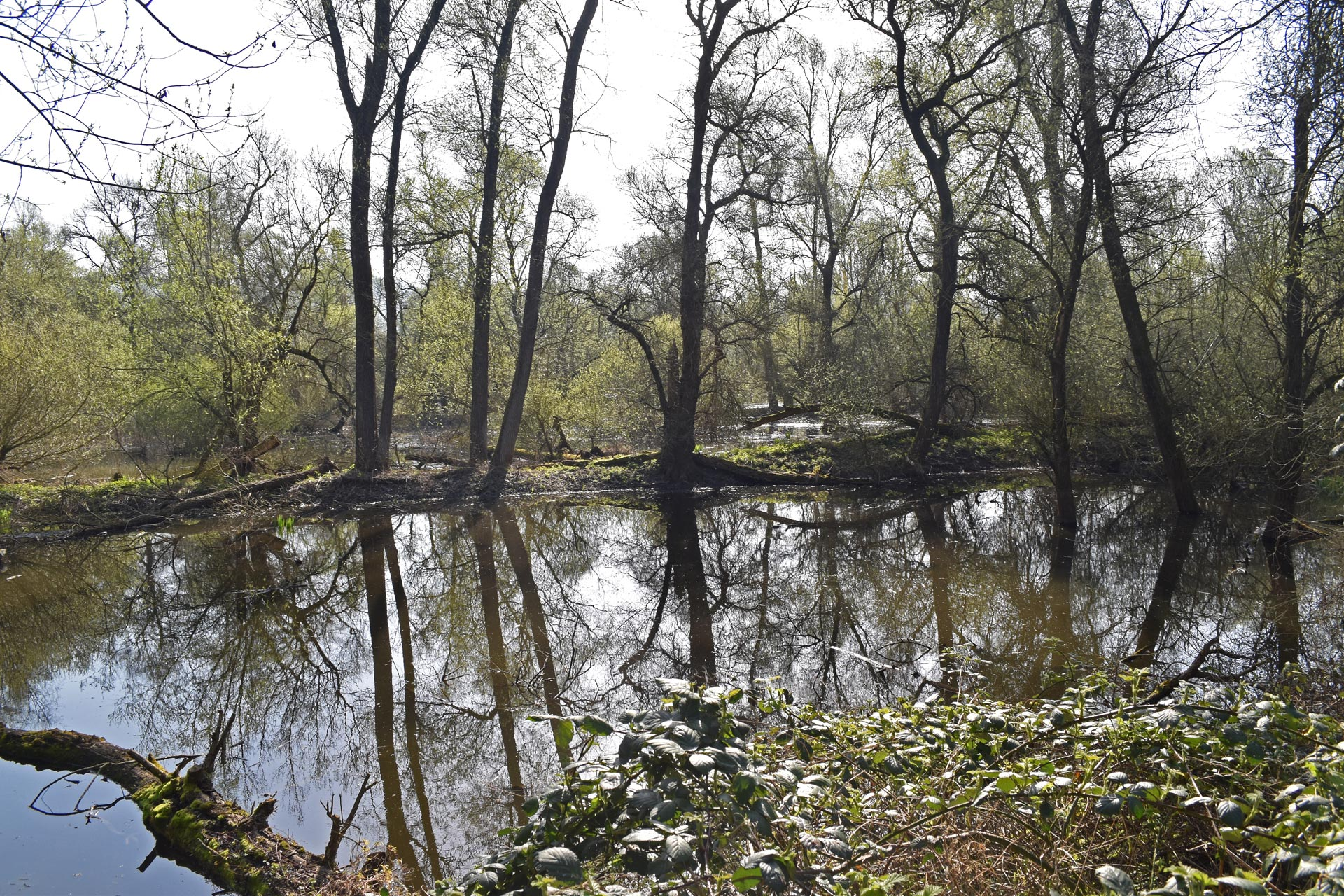 Tongrubengelände von Bensheim und Heppenheim